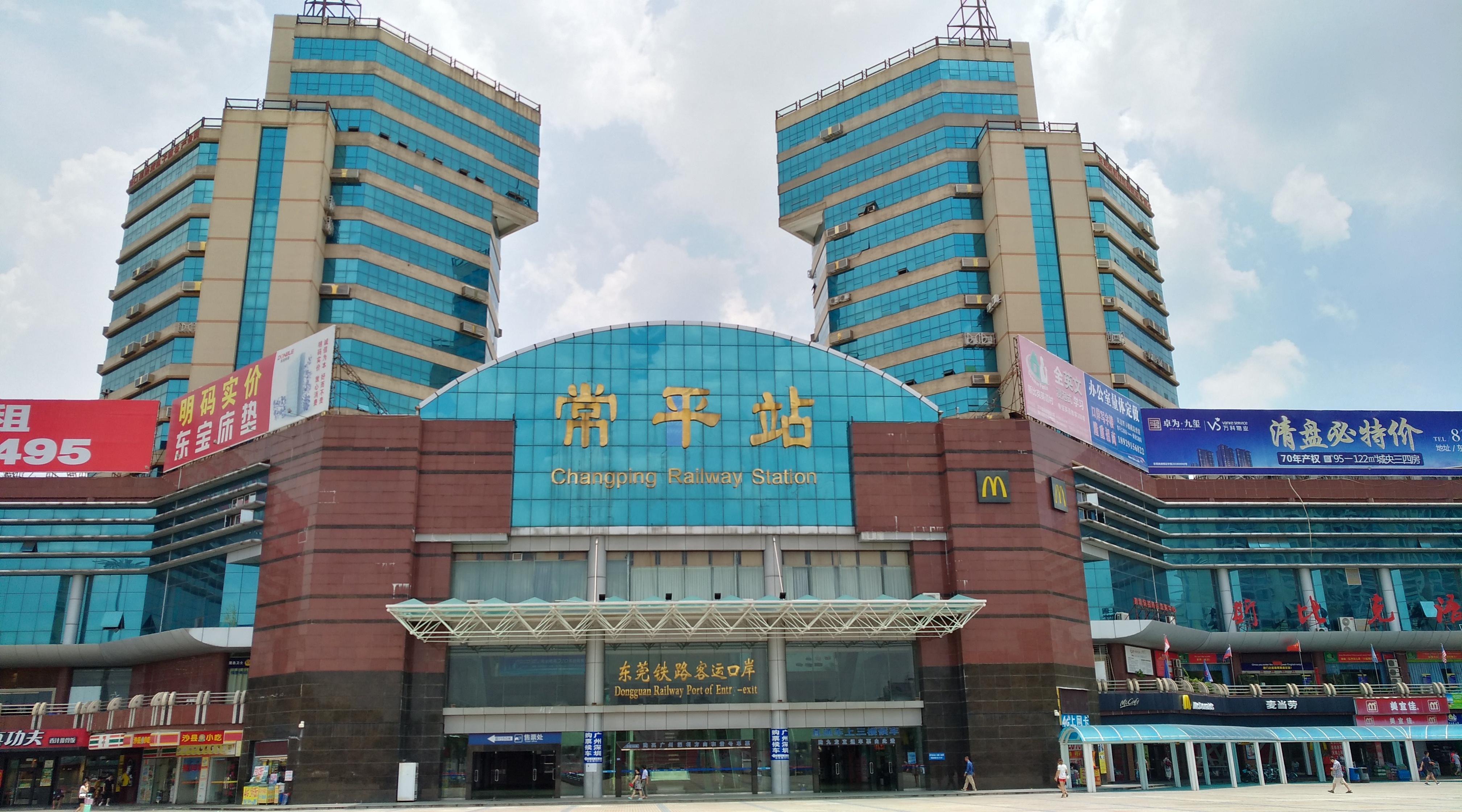 中国铁路 常平站 铁路口岸入口